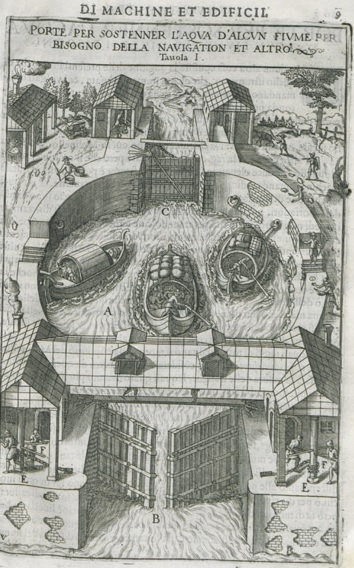 Canale artificialetratto da Novo teatro di machine et edificii